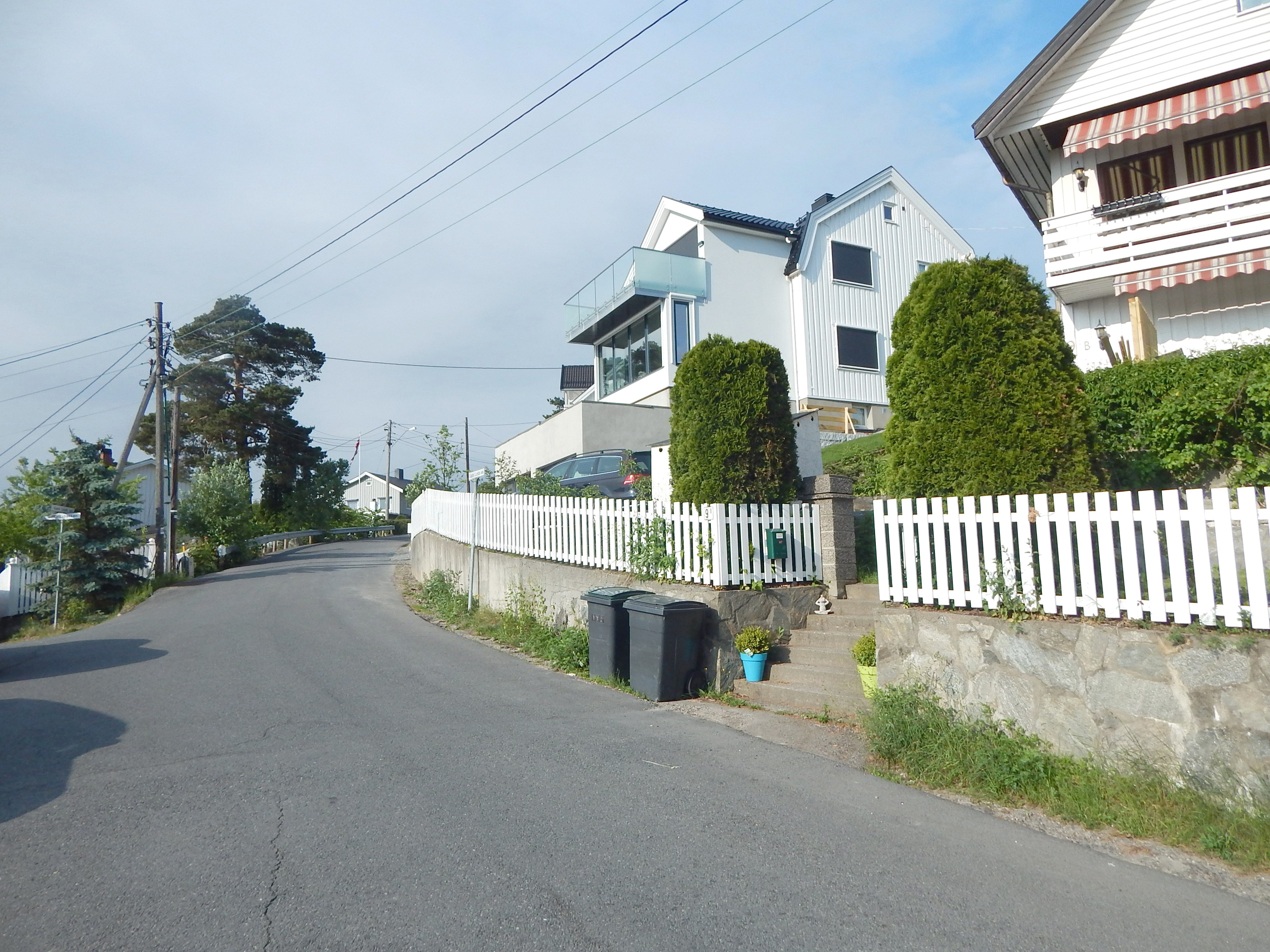 Gabbi Lunds vei